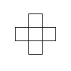 Une image très simple créee par moi meme sous photoshop représenant un maillage carré...